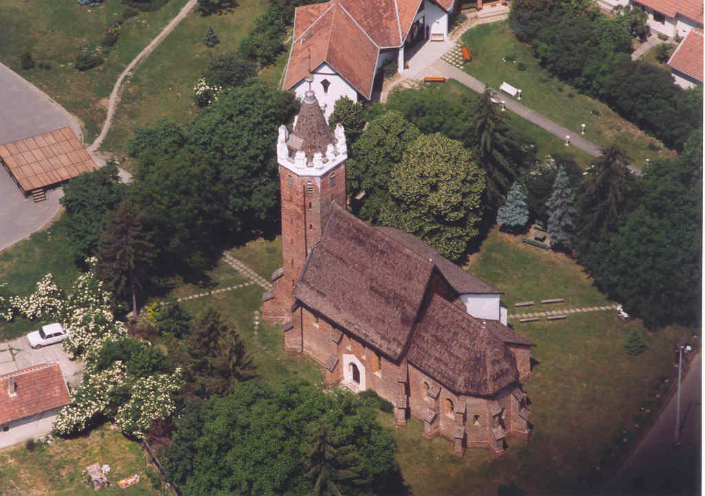 Csenger - Hungary - Europe